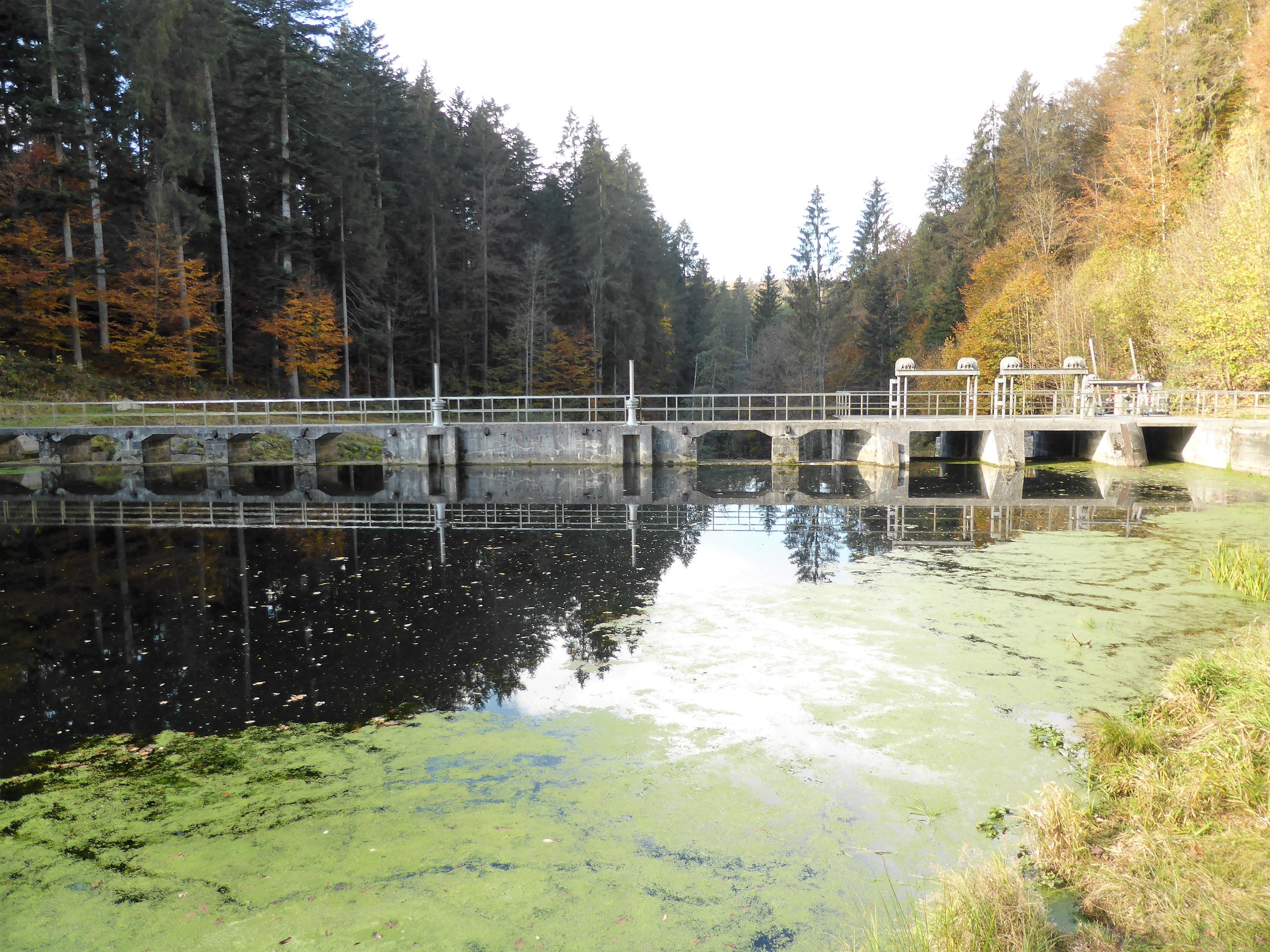 Saußbach-Stausee bei Freyung (Buchberger Leite).